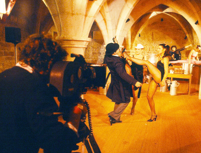 Scéne de tournage sur le téléfilm "Les Rats de cave", réalisé par Jean-Claude Morin (1981)